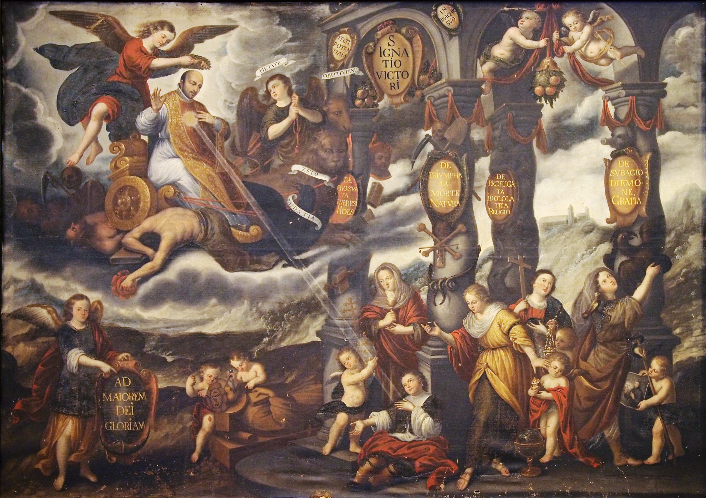 Apoteosis de San ignacio de Loyola, 1675, por Diego Díez Ferreras. Iglesia de San Miguel y San Julián (Valladolid).